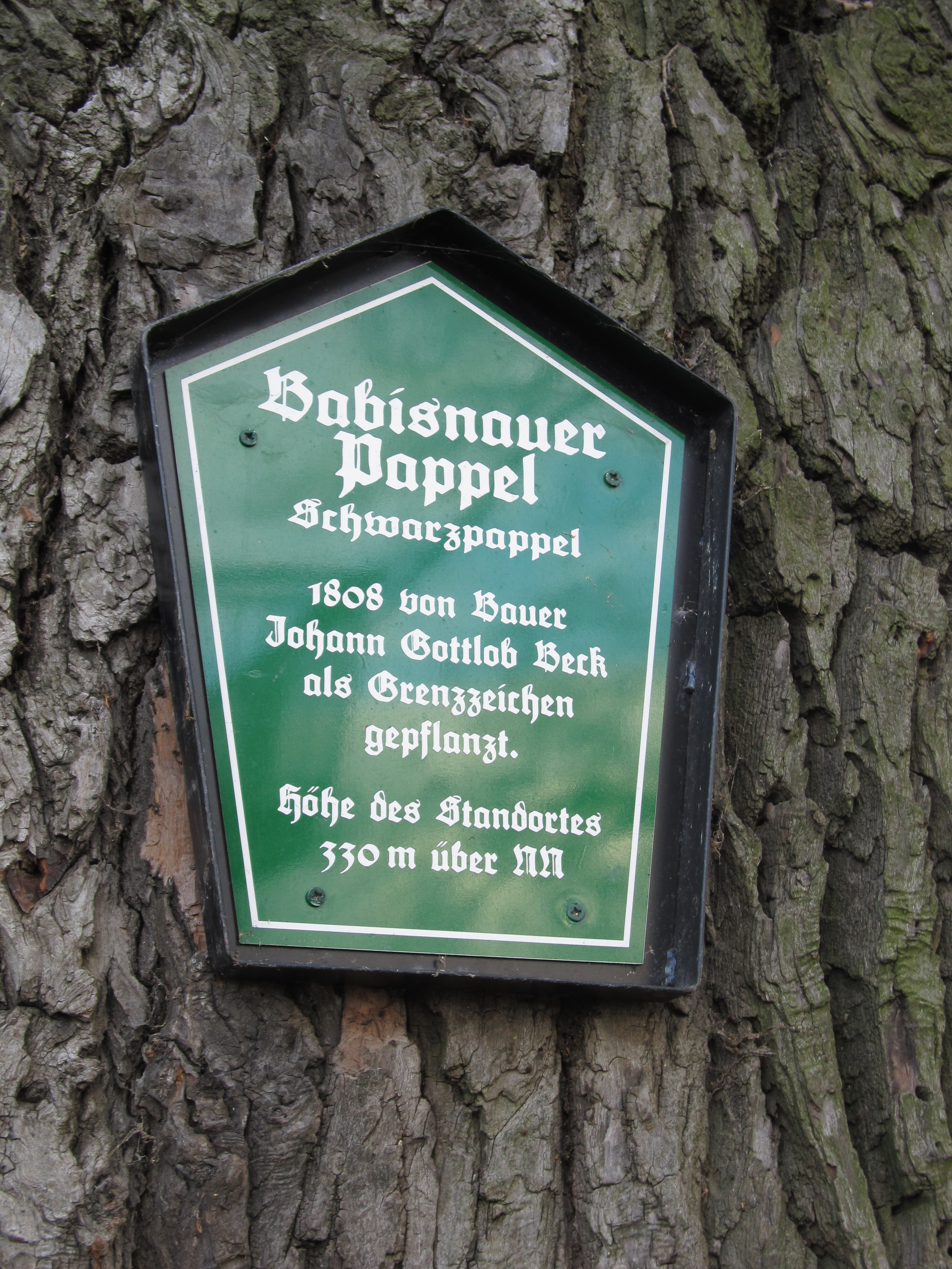 Hinweisschild an der Babisnauer Pappel, Gemeinde Kreischa, Landkreis Sächsische Schweiz-Osterzgebirge